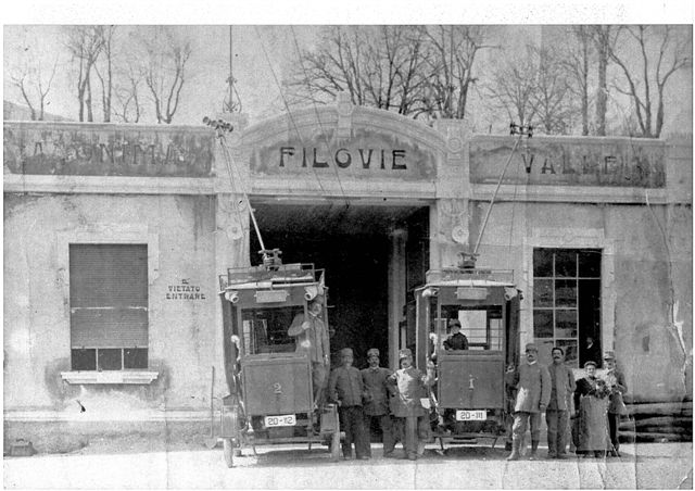 La rimessa della filovia della Val d’Intelvi, sita in località Capria, nel territorio comunale di San Fedele Intelvi.